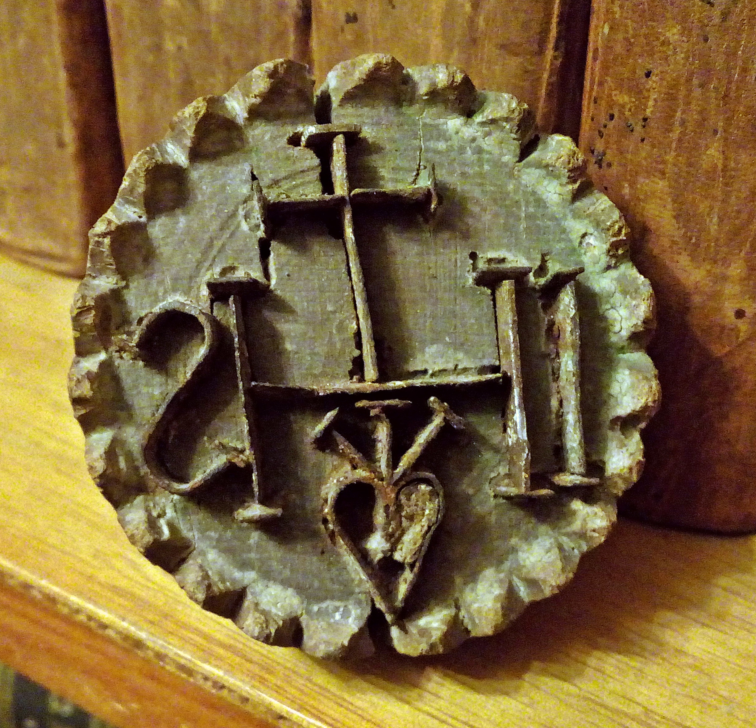 Barocker Brotstempel